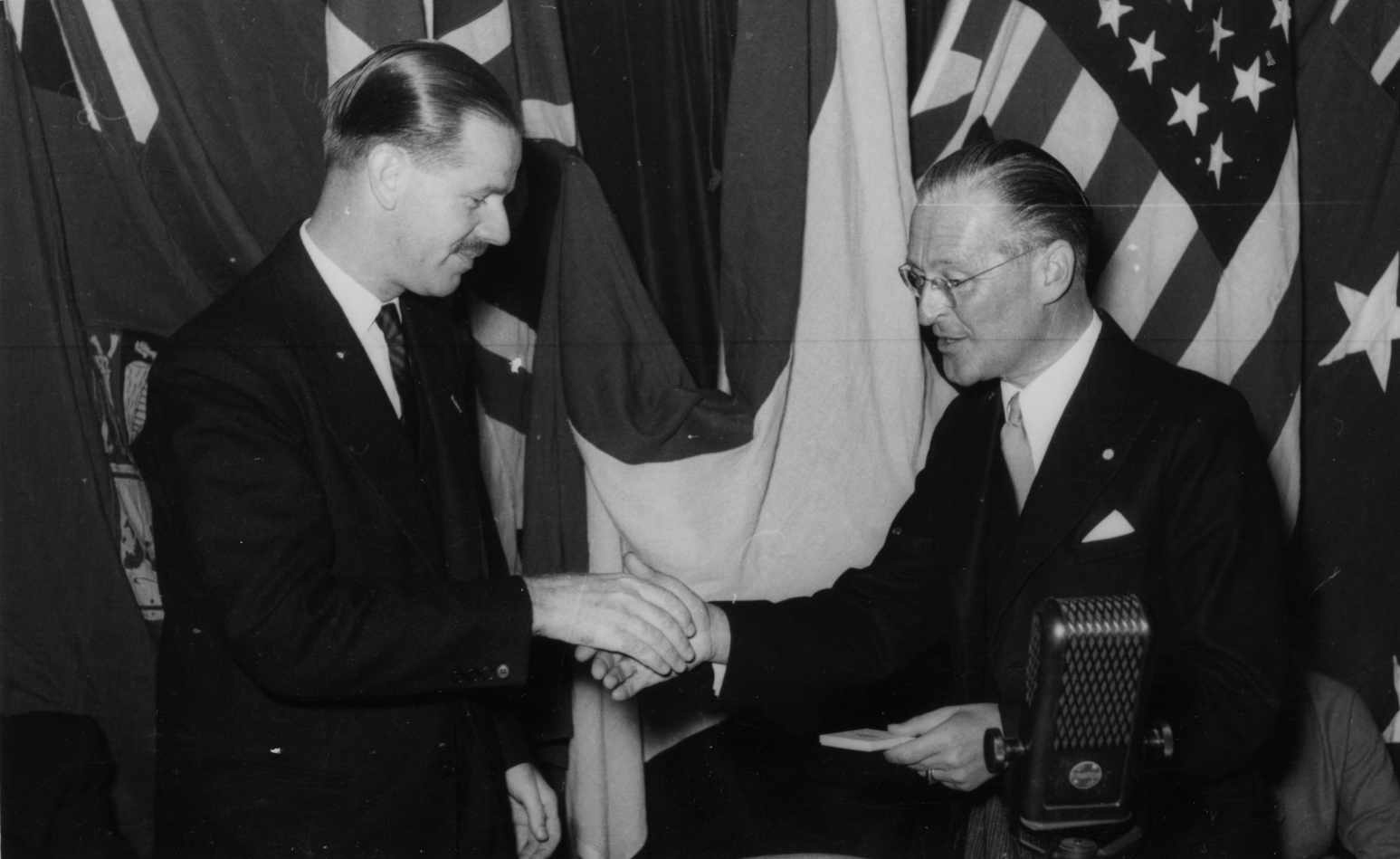 Feestelijke bijeenkomst van de Niijmeegse oorlogsinvaliden georganiseerd door de '17-September commissie' van de Nijmeegse Handelsvereniging. Burgemeester Hustinx schudt de hand van majoor Bestebreurtje